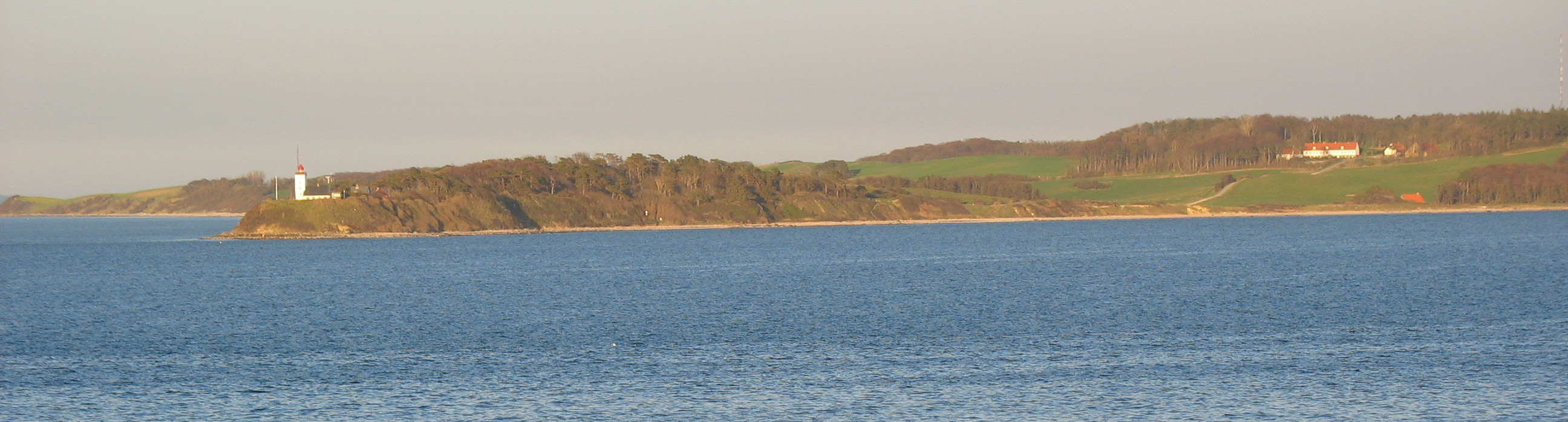 Røsnæs - det vestligste punkt på Sjælland